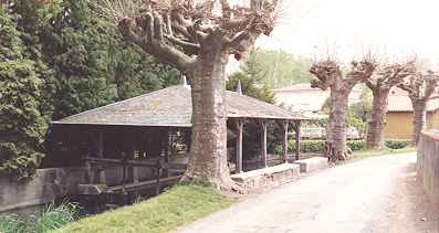 Le lavoir de Champagne-Mouton